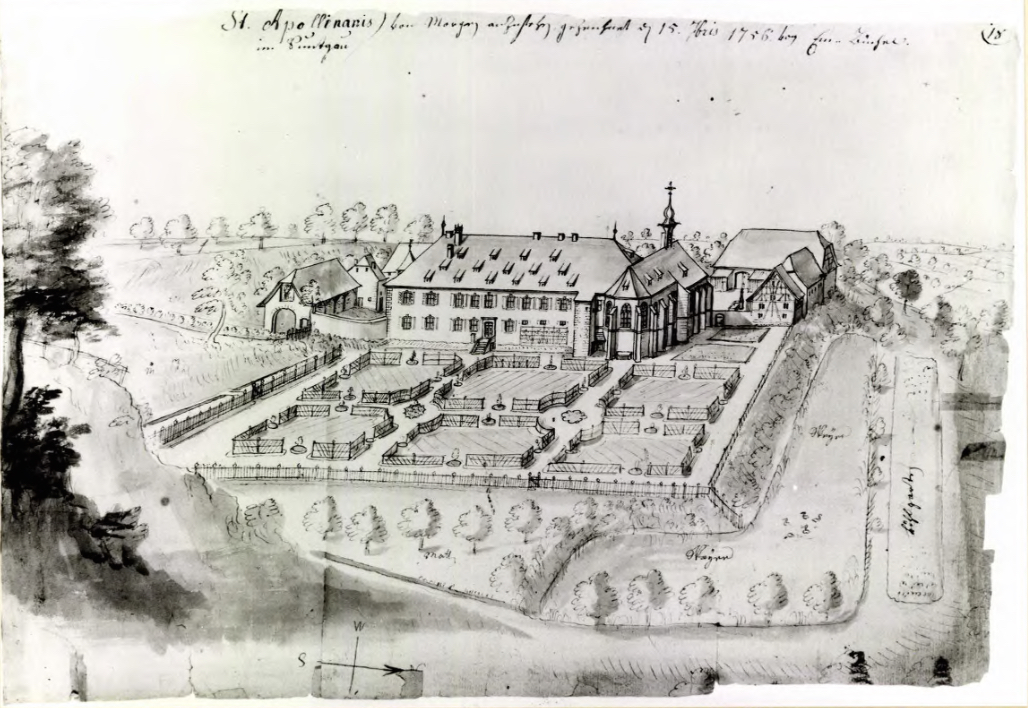 Les bâtiments de l’abbaye Saint-Apollinaire dessinés le 15 septembre 1756 par Emmanuel Büchel.